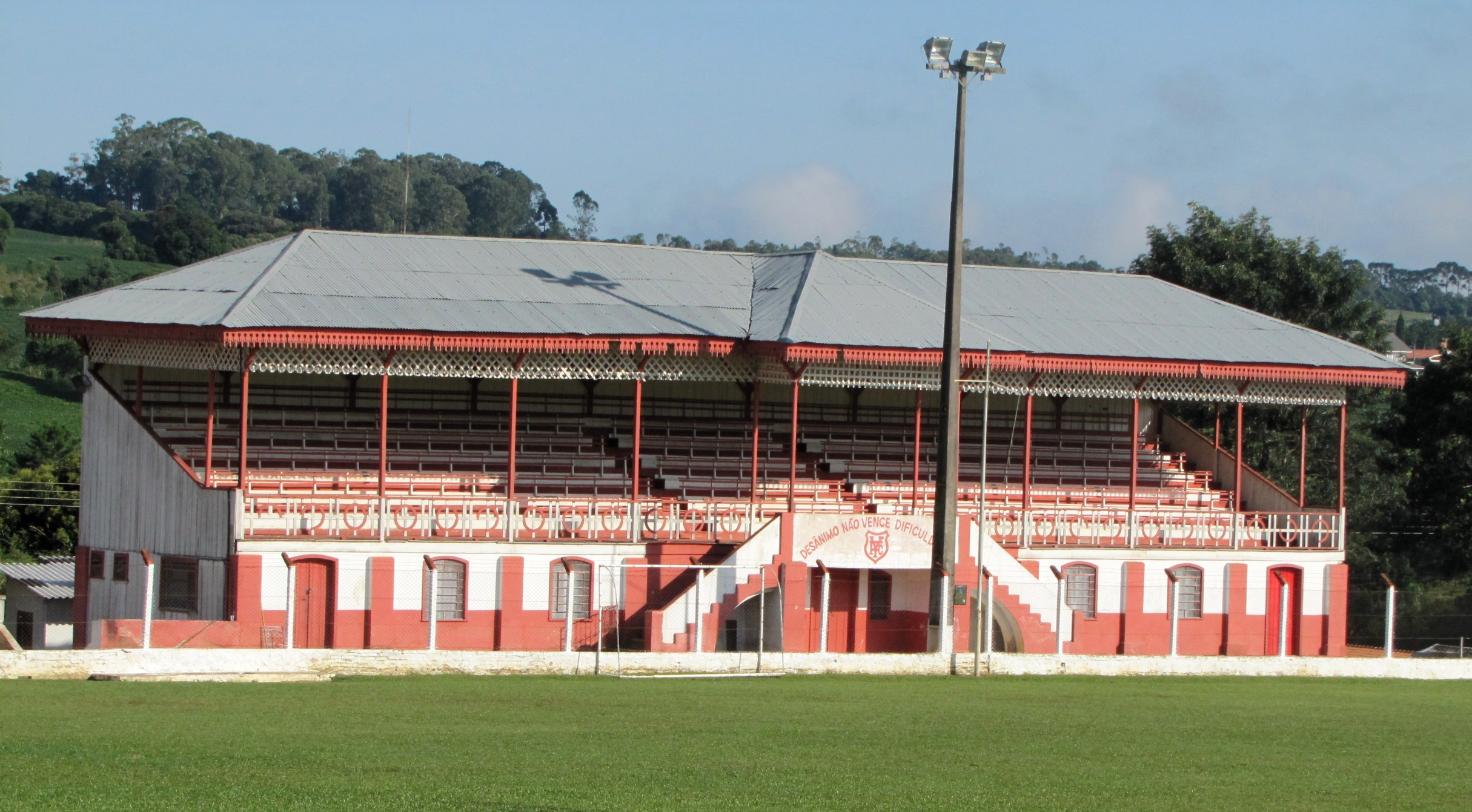 Estádio João Chede - Clube de futebol Ipiranga.